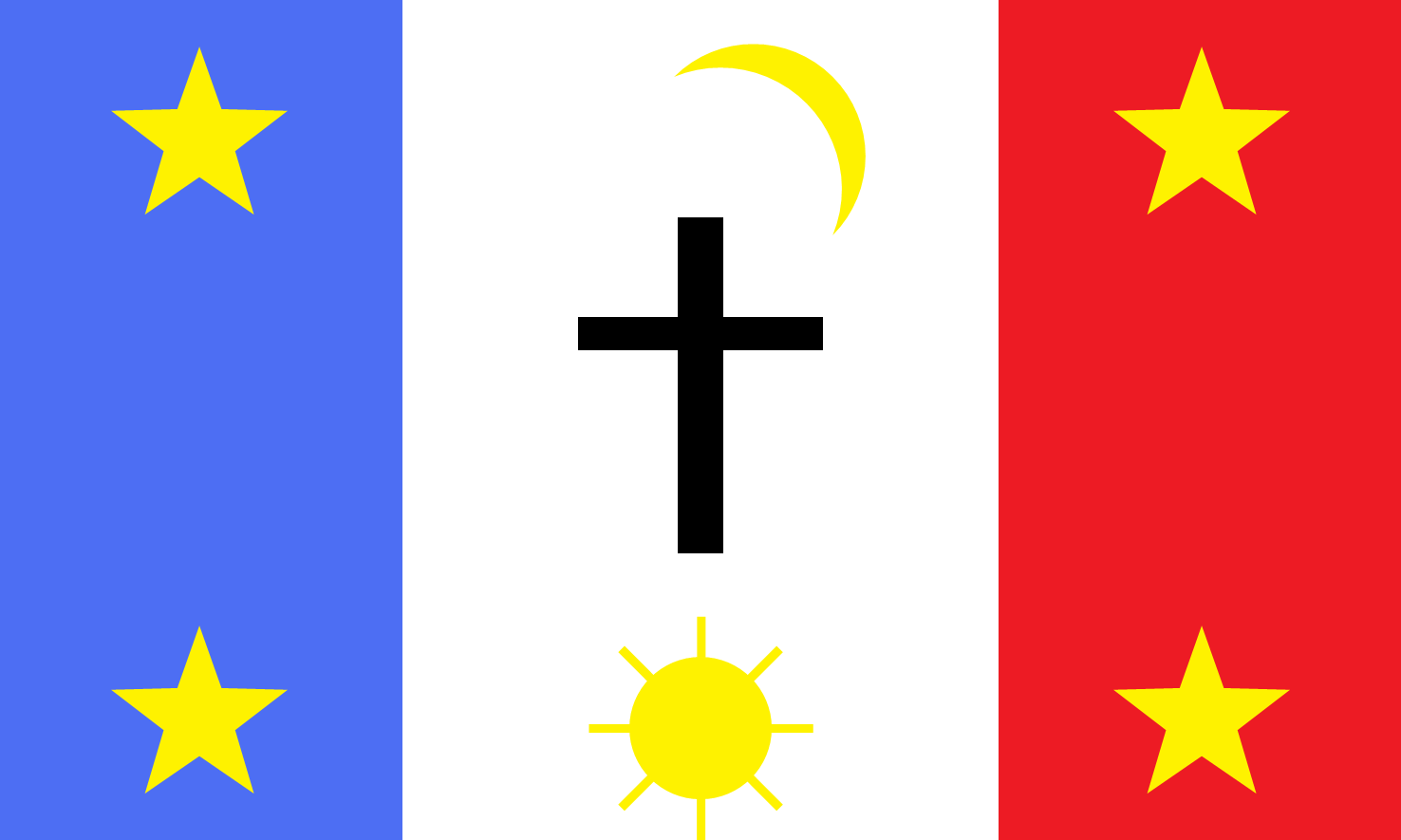 Bandera del Pueblo yaqui.